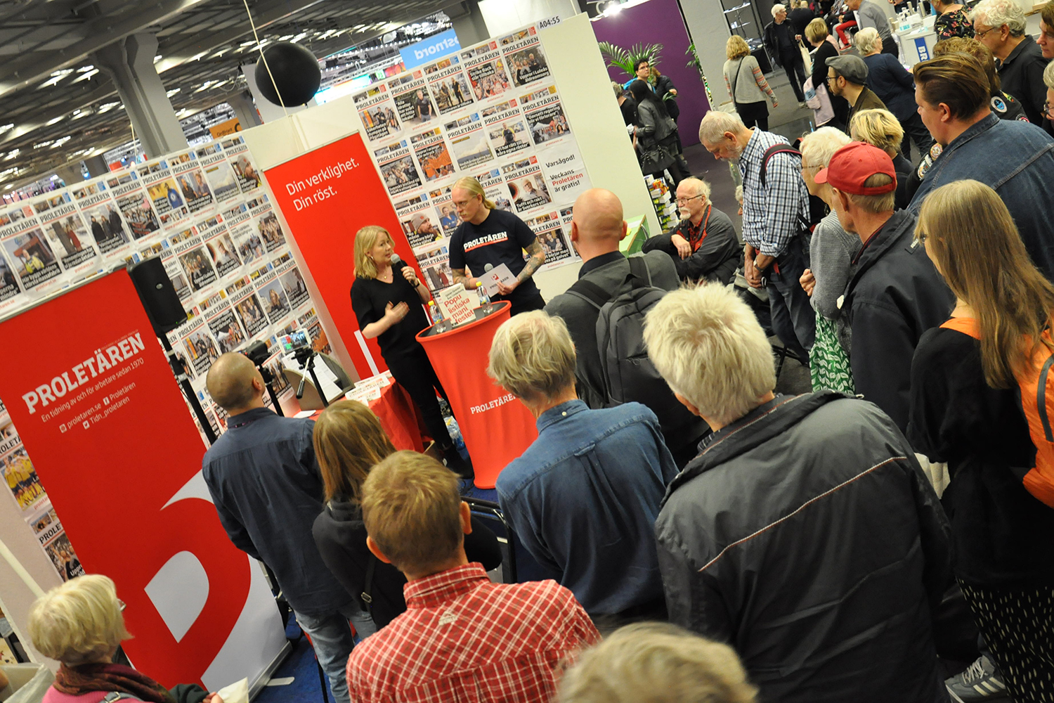 Proletären intervjuar Aftonbladets kulturchef Åsa Linderborg på Bokmässan 2018.